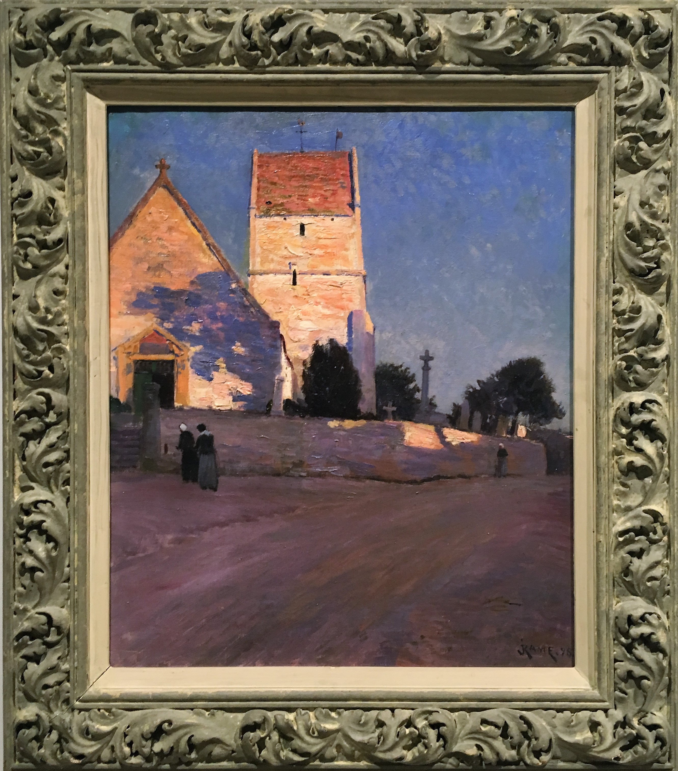 Huile sur bois de 1898 acquise par le musée des beaux arts de Caen en 1999.